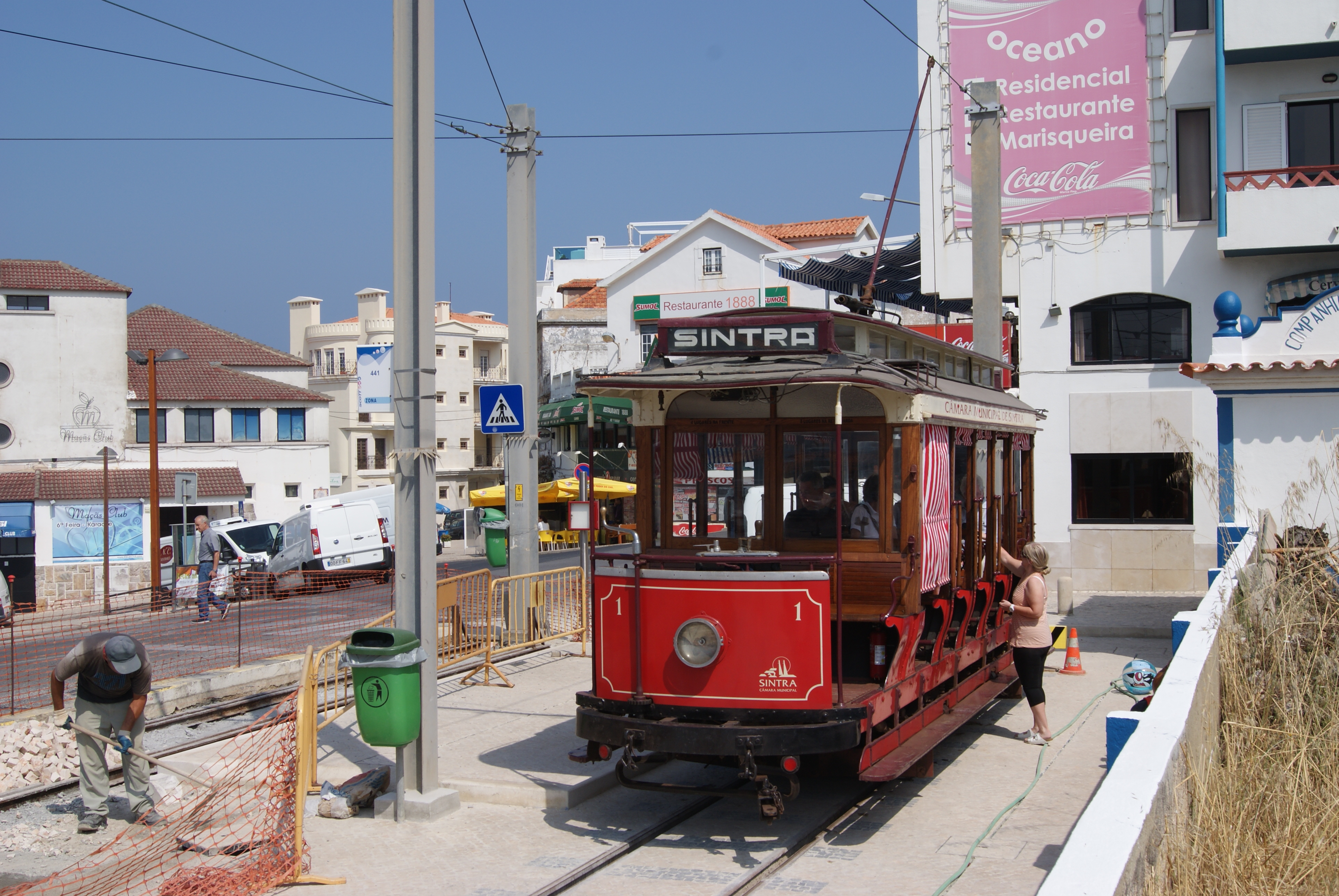 Photo: Trams aux Fils. Magnifique ligne de trams avec des employés très aimables, points négatifs, trouver le départ du tram depuis la gare du train, car vous ne trouverez aucune indication, et pour les amateurs de trams, pas de cartes postales, pas de revues sur le tram, pas de maquettes de trams, comme pour les trams de Lisbonne,etc. "Dommage".